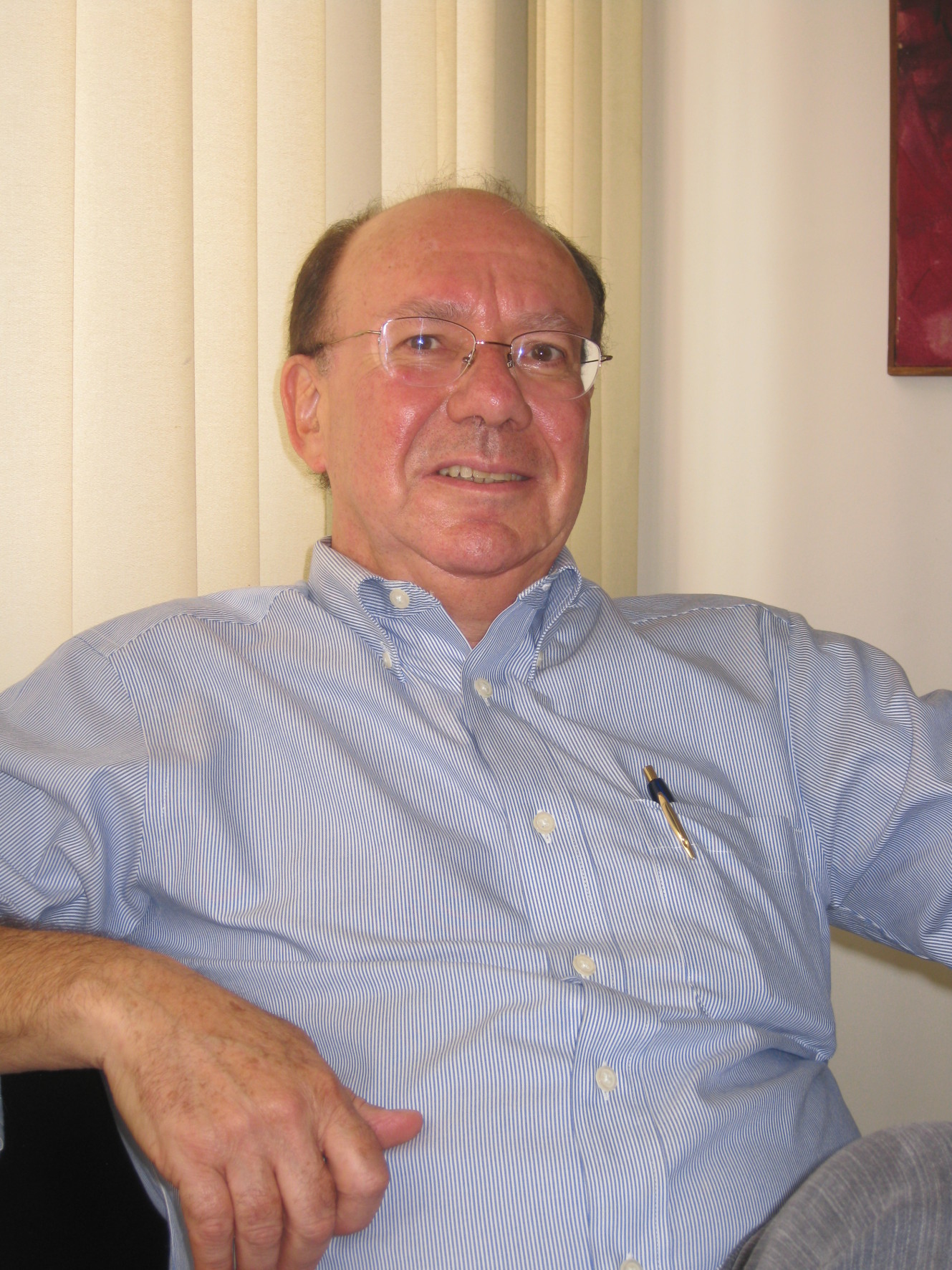 Escritor Celio Pezza